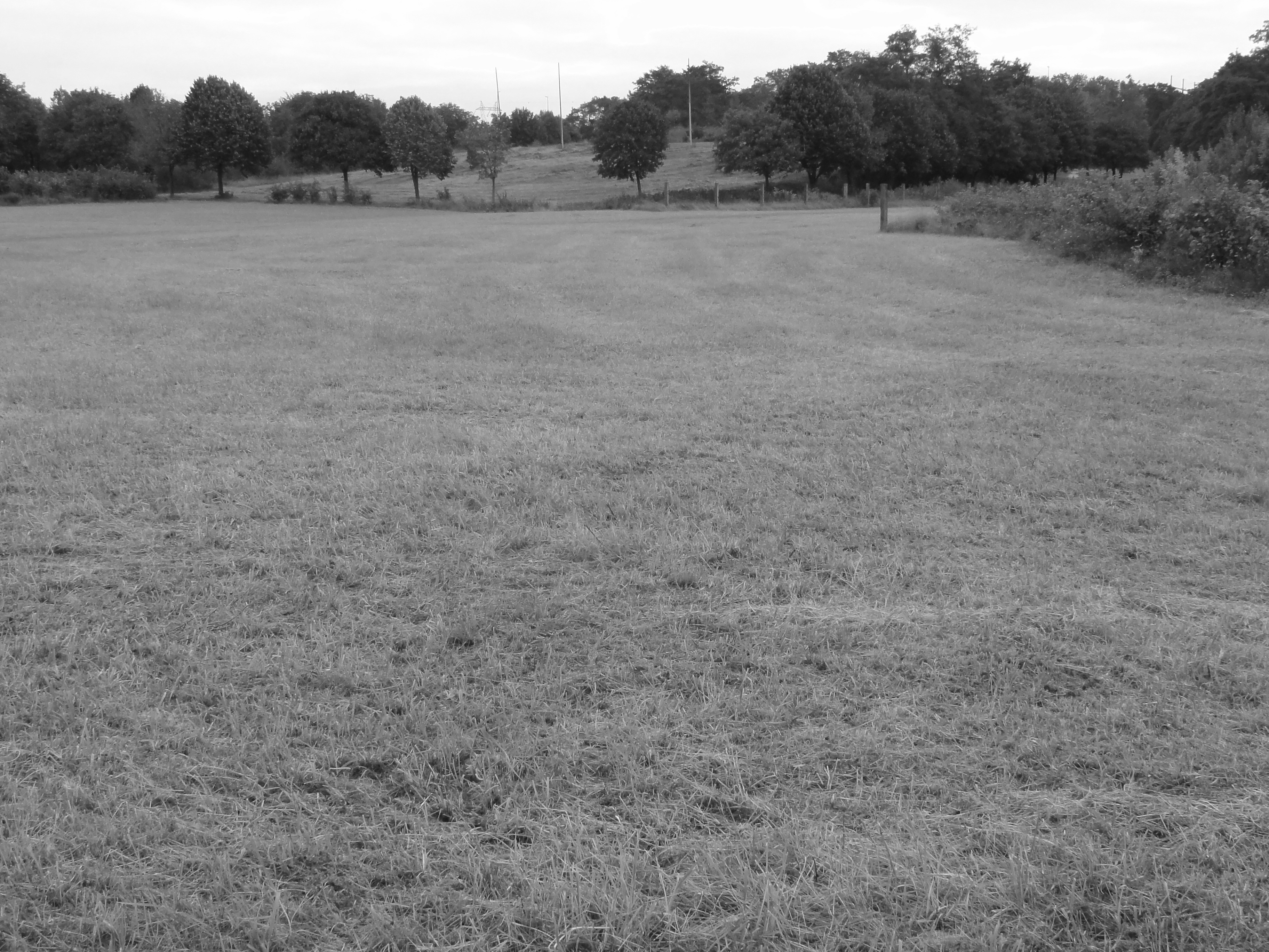 Terril n° 78 dit 15 de Lens, fosse n° 15 - 15 bis de la Compagnie des mines de Lens dans le bassin minier du Nord-Pas-de-Calais, Loos-en-Gohelle, Pas-de-Calais, Nord-Pas-de-Calais, France.